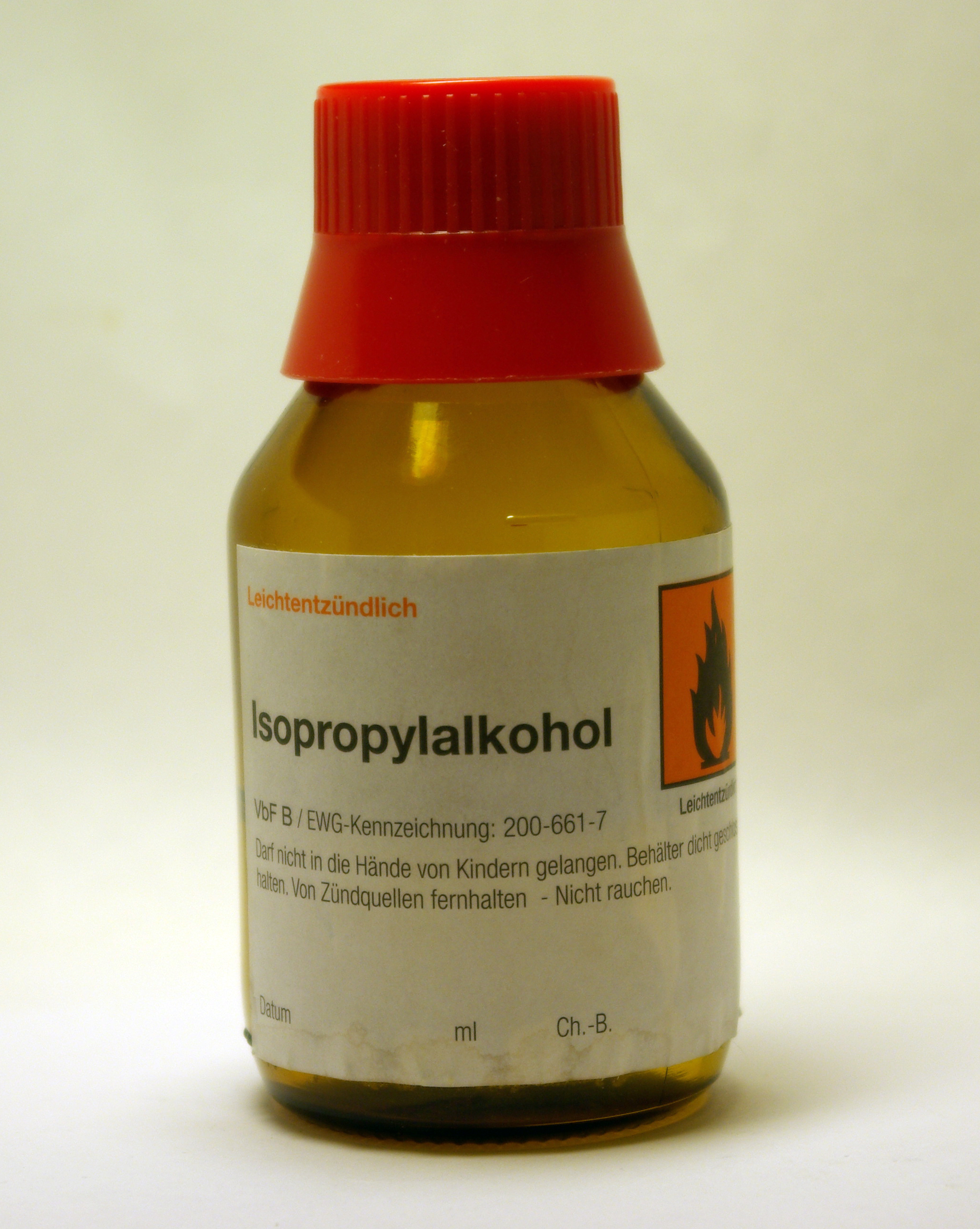 Flasche mit Isopropanol (Isopropylalkohol, 2-Propanol) für den Hausgebrauch aus der Apotheke